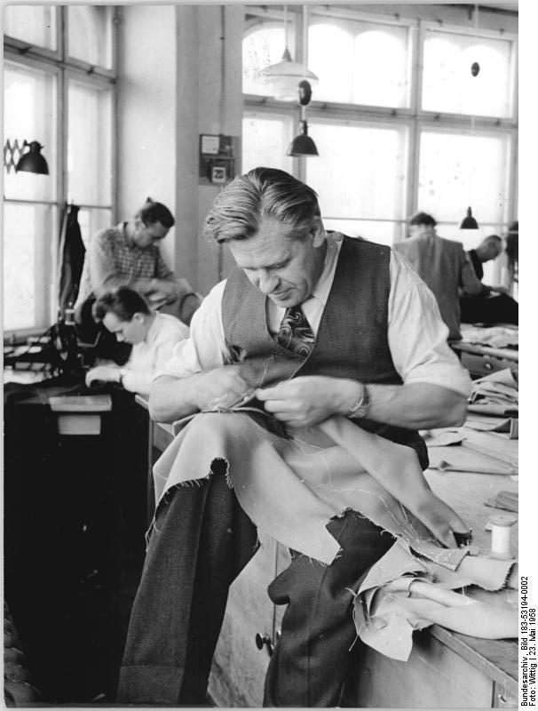 Zentralbild-Wittig Vgt-Noa-23.5.1958 Geraer "Modezentrum" hat sich bewährt. Im Mai 1957 hatten 13 Mitglieder die Handwerksproduktionsgenossenschaft "Modezentrum" in Gera gegründet. Sie erarbeiteten trotz Anfangsschwierigkeiten bis zum Jahresende 1957 10.000,00 DM Reingewinn. Heute zählt die Handwerksproduktionsgenossenschaft bereits 34 Damen und Herrenschneider, davon 4 Lehrlinge. 100,- DM bis 120,- DM monatlich mehr Verdienst als bei einem Einzelmeister ist das Ergebnis der guten Arbeit der Genossenschaftsmitglieder. UBz. : Der Schneidermeister Rudi Panzer hat 12 Jahre selbständig gearbeitet, bevor er in die HPG "Modezentrum", Gera, eintrat. .. " Ich gehöre zu denen, die vor nunmehr einem Jahr die Produktionsgenossenschaft gegründet haben, und ich muß sagen, daß mir die Arbeit im Kollektiv besser gefällt und daß es seit dieser Zeit ständig aufwärts geht.". erklärte Rudi Panzer."